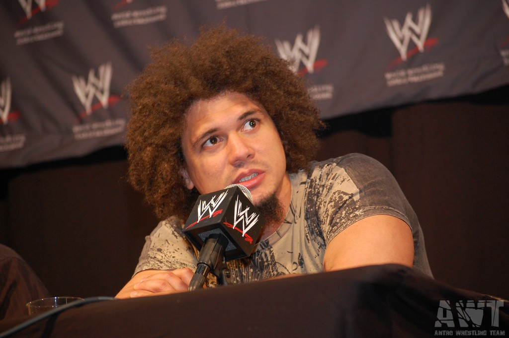 Carlos Colón, Jr. (alias Carlito) lors d'une conférence de presse en 2008.